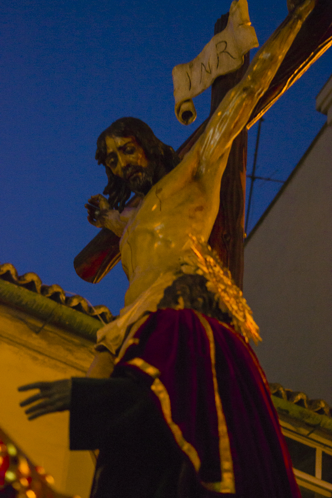 2014 Holy Week in Málaga